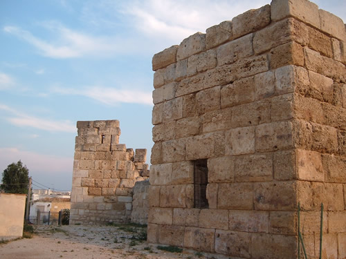 autore:Luigi Capozzi descrizione:Castello Canosa di Puglia anno:2007